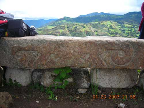 Piedra tallada en San Pedro-Pacopampa